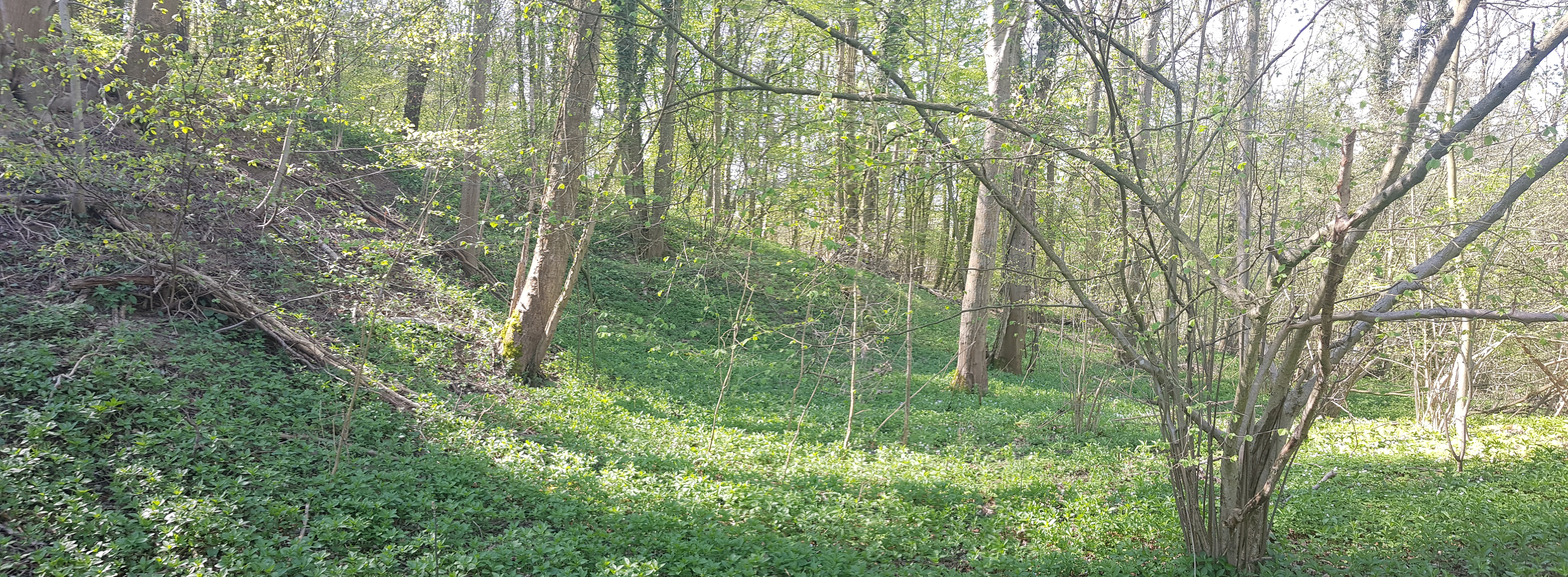 vuursteenmijnen Biebosch, Valkenburg, Nederland